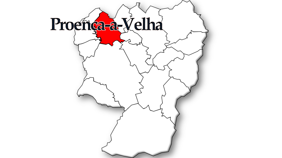 População